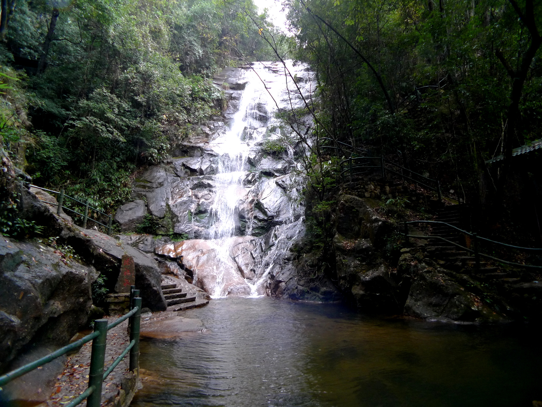 武夷山瀑布.JPG